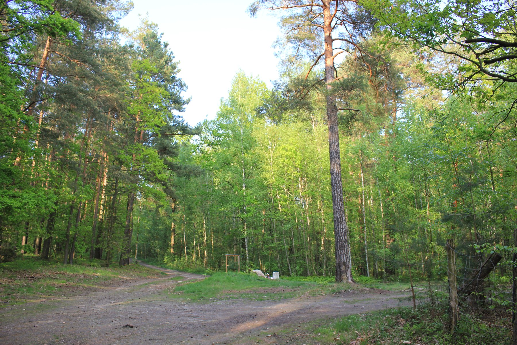 Hornjoserbsce: Městno pomnika za wot nacionalsocialistow zamordowaneho Stanisława Błażejczuka w lěsu pola Łomska.